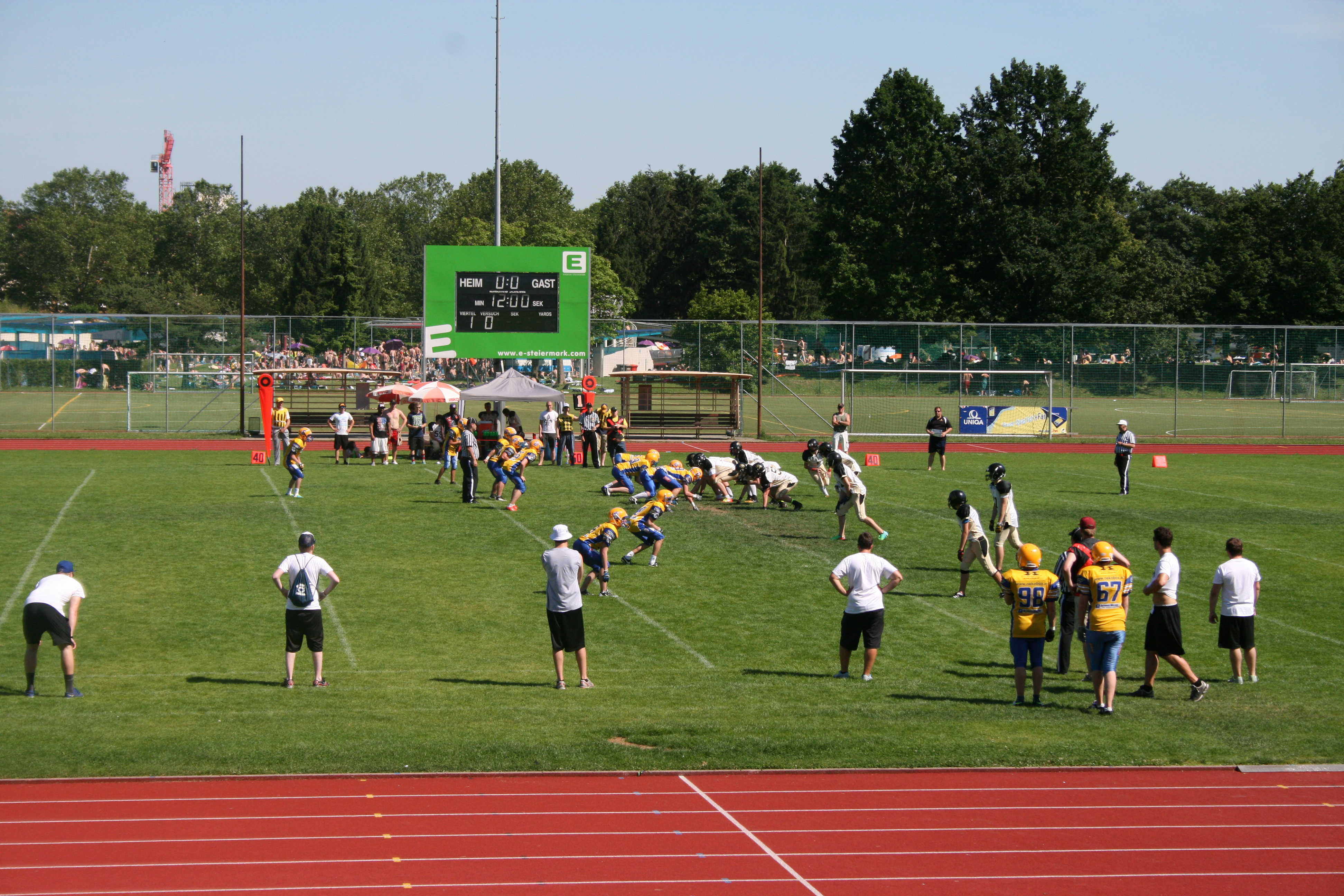 Nachwuchsspiel der GG 2014